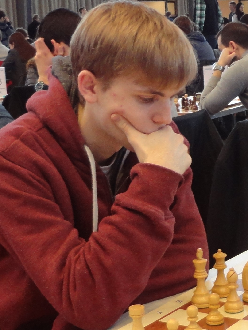 Jonas Lampert, Grenke Chess Open 2016 in Karlsruhe.